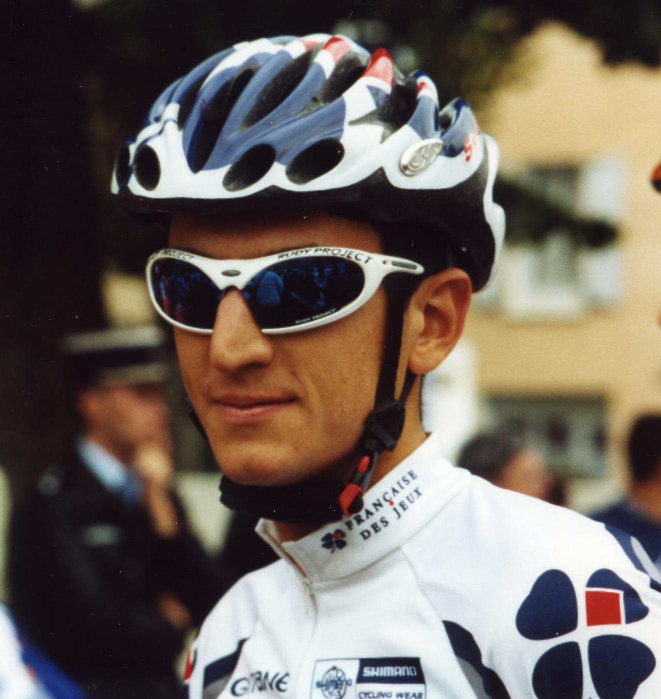 TOUR DE L'AVENIR 2001